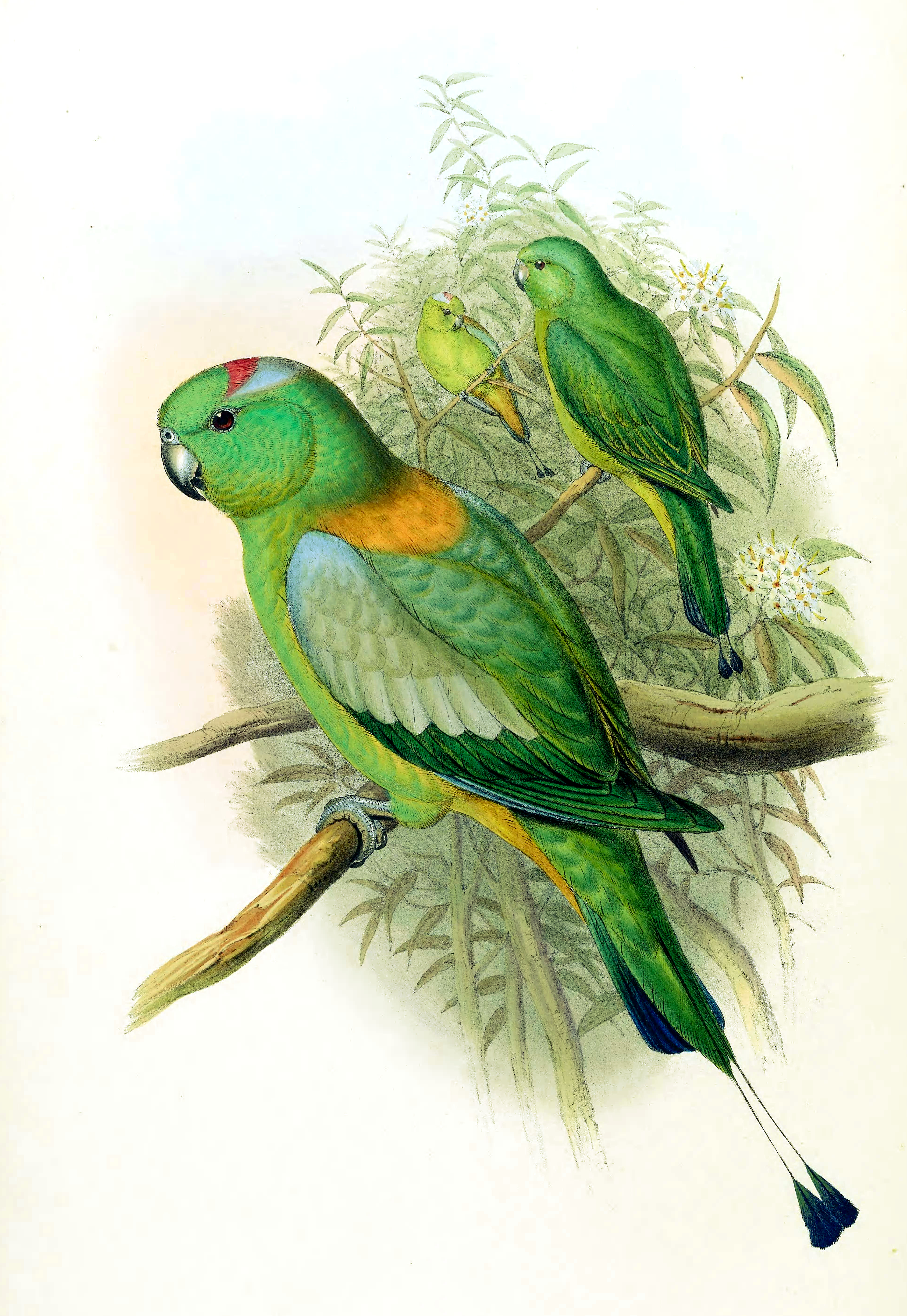 Prioniturus setarius = Prioniturus platurus[1]